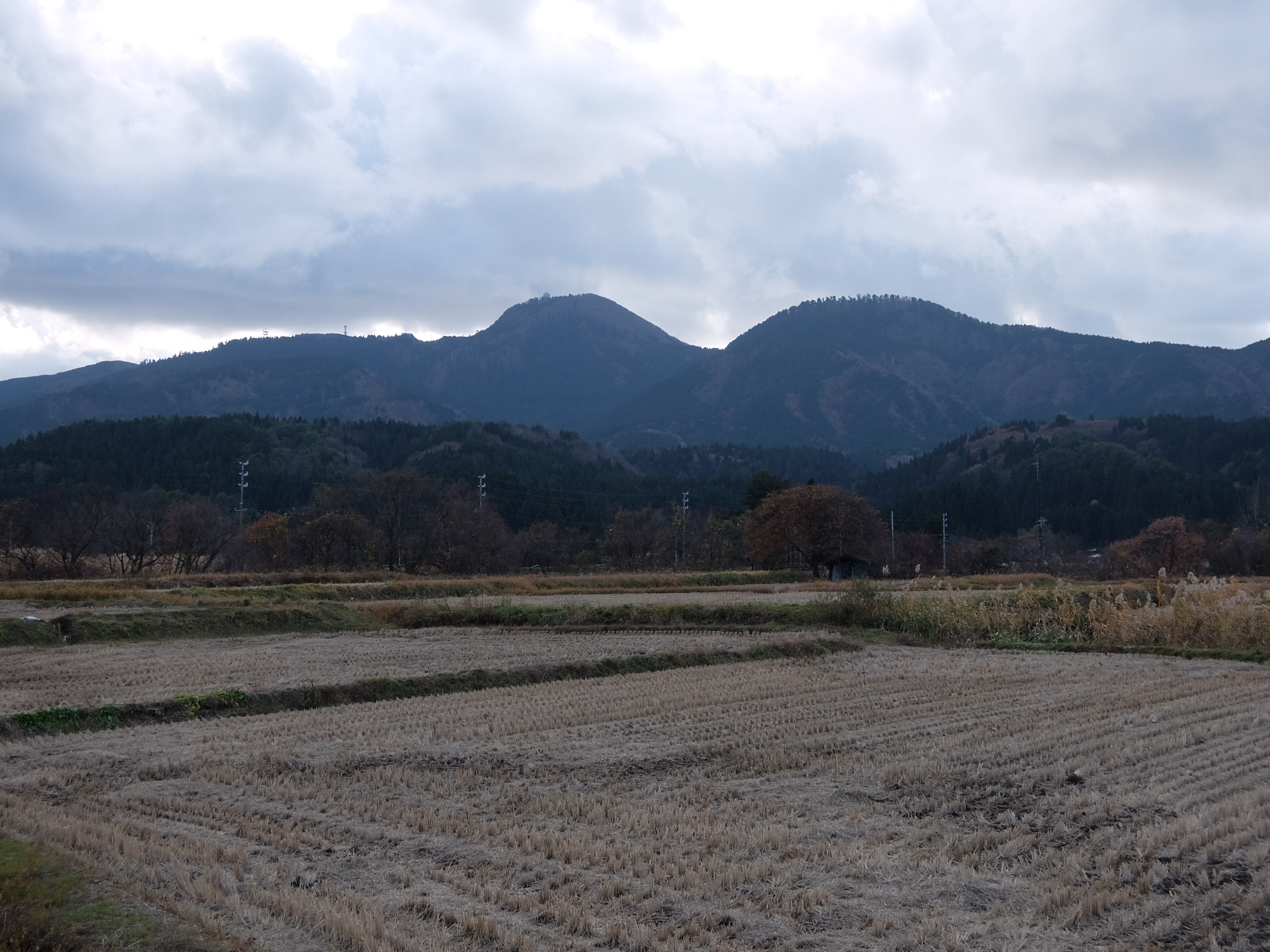 秋田県男鹿市北浦安全寺から見た男鹿三山 中央が男鹿本山、右が男鹿真山、左の奥に毛無山